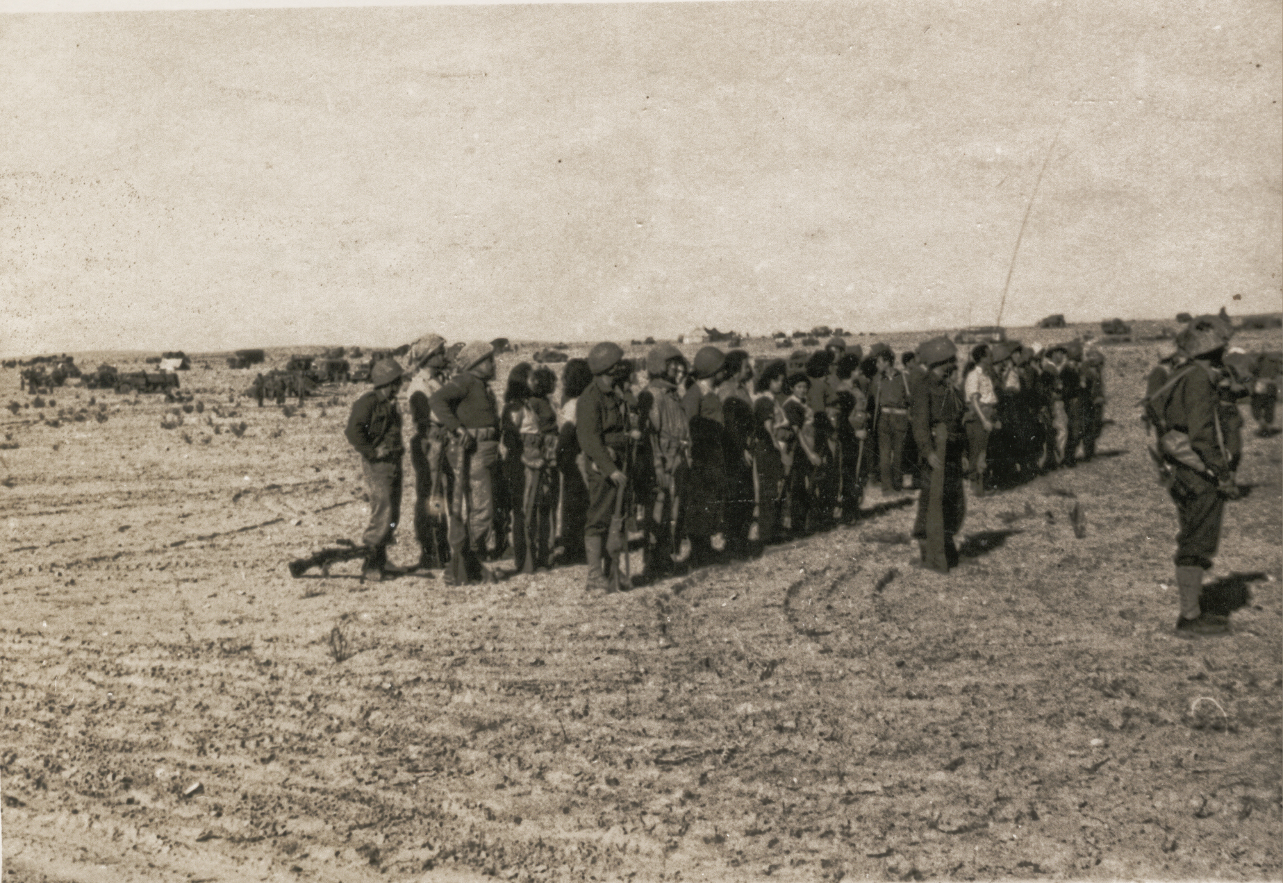 מבצע חורב עין, מפקד היציאה בחלוצה דצמבר 1948 חנוכה תש"ט 7.12.1948